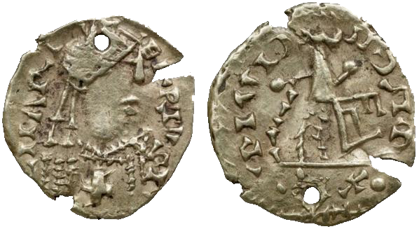 Tiers de sou de Caribert Ier frappé à Aire (561-567). BNF, monnaies, médailles et antiques. Avers : Buste diadémé, drapé et cuirassé à droite, une croix sur la poitrine. Revers : Victoire à droite tenant deux globes.